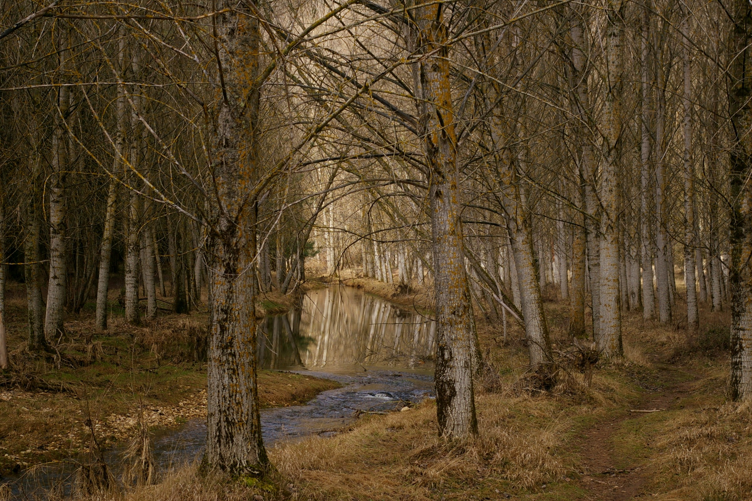 Parque Natural del Cañón del Río Lobos.